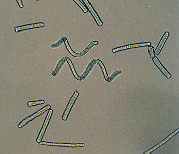 Spirulina